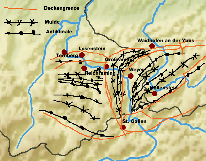 Geologische Skizze der Weyerer Bögen auf Grundlage von File:Upper Austria Topographic Empty.png, nach Alexander Tollmann: “Tektonische Karte der Nördlichen Kalkalpen” PDF-File